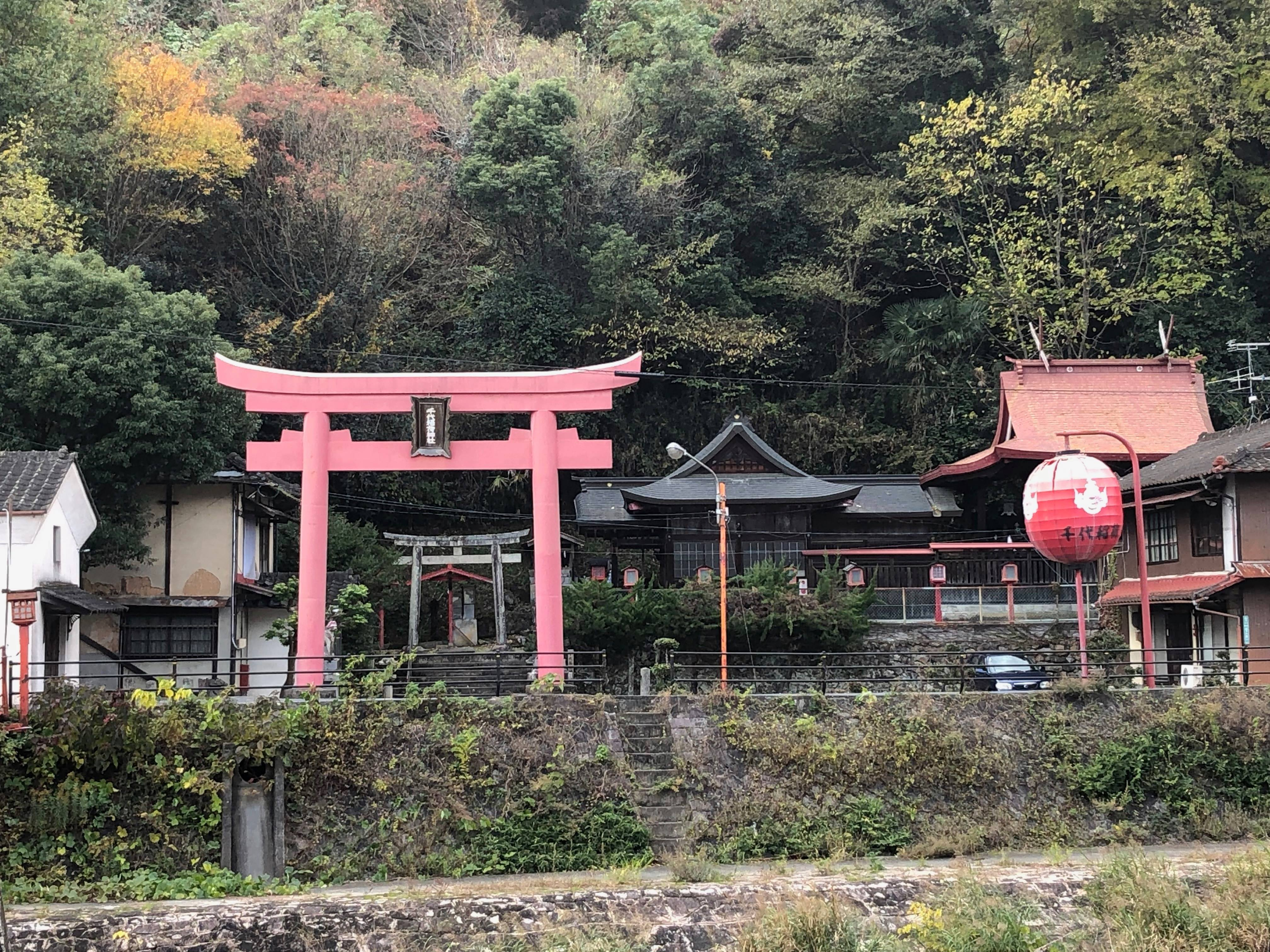 岡山県津山市山下にある神社。本殿は江戸時代前期の建築